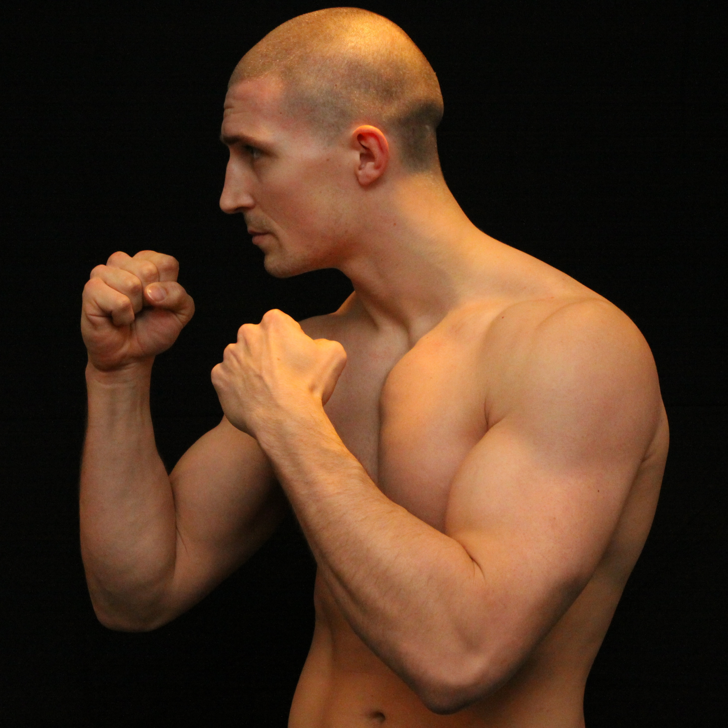 Michael Grandorf Bender